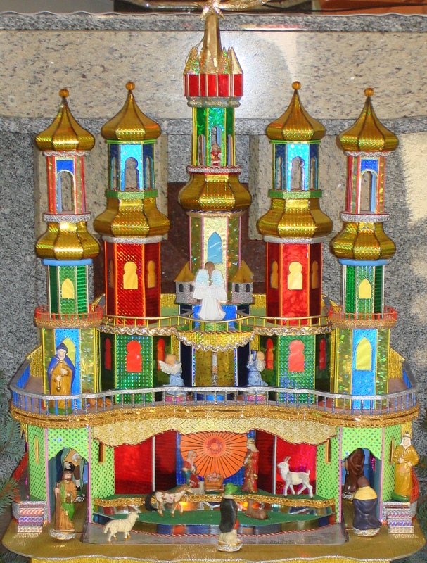 Szopka krakowska autorstwa Andrzeja Morańskiego. Kamienna Góra, kościół pw. Najświętszego Serca Pana Jezusa